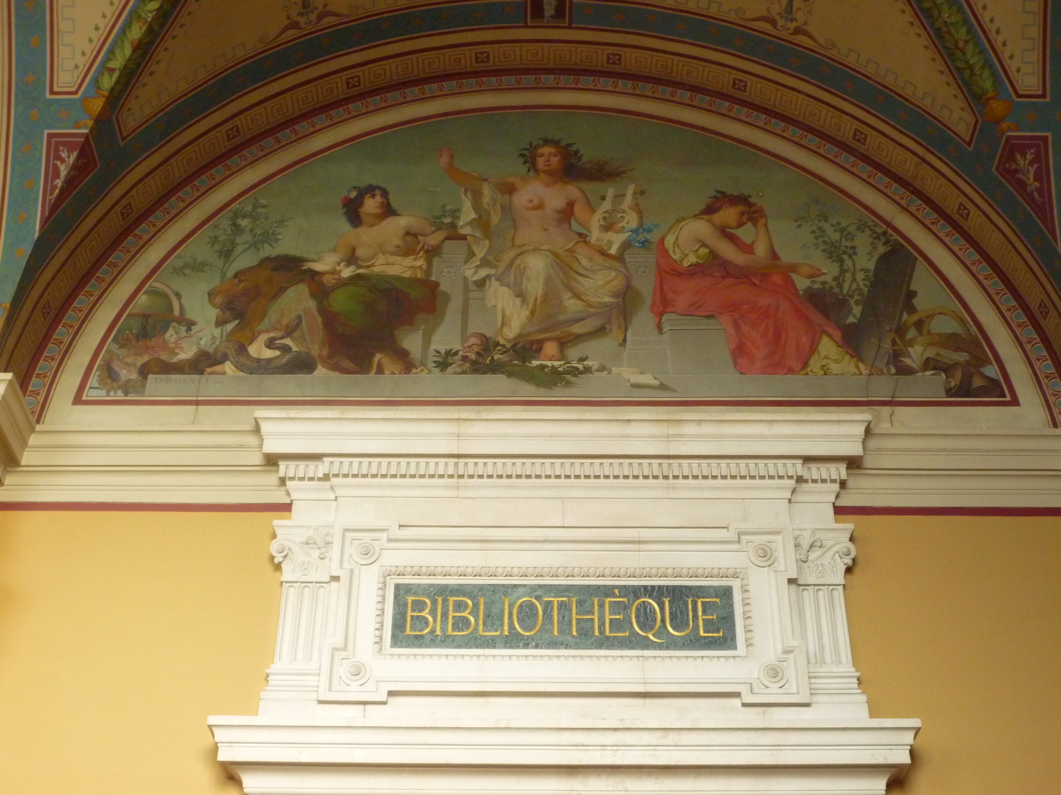 Entrée de la salle de la bibliothèque dans l'ancien musée-bibliothèque place de Verdun à Grenoble.